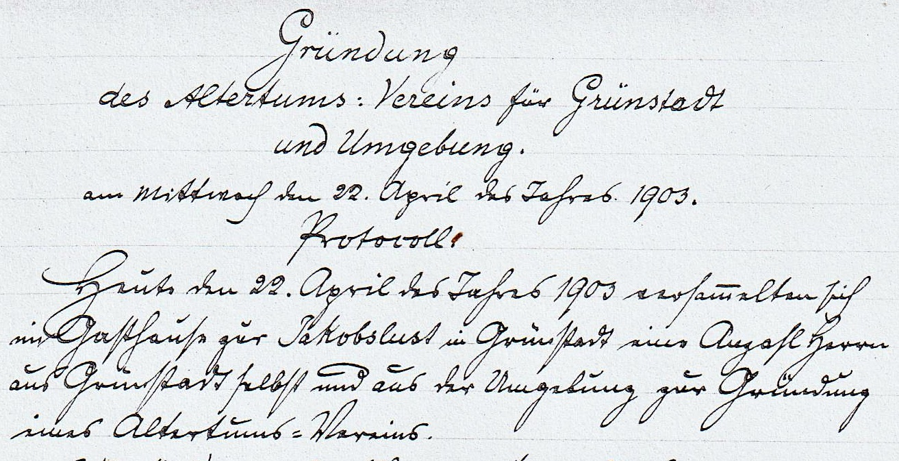 Protokoll über die Gründungsversammlung des Altertumsvereins Grünstadt, 1903, verfasst von Pf. Stephan Lederer (Ausschnitt)